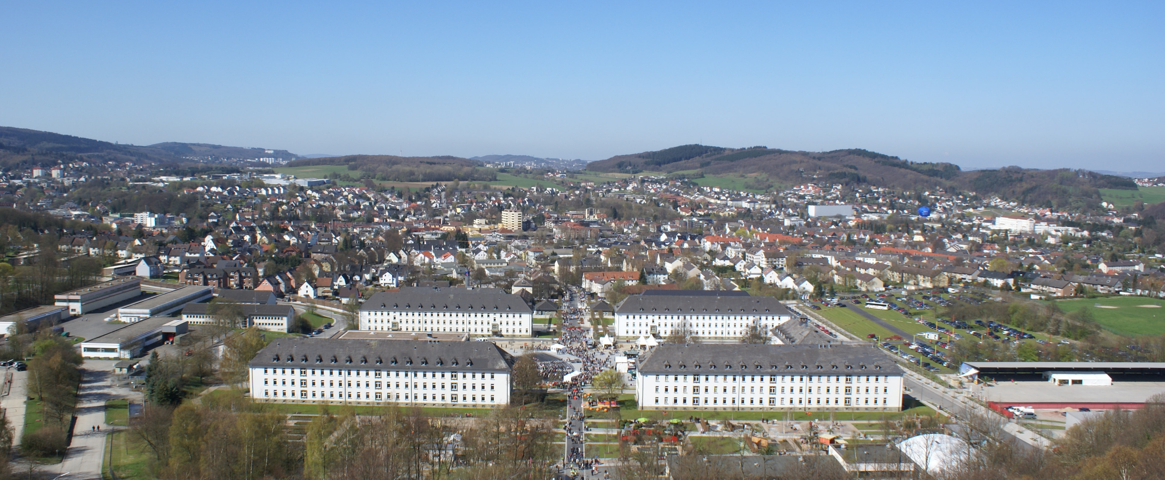 Überblick vom Jübergturm über die Landesgartenschau Hemer 2010 (vorne) und die Stadt Hemer